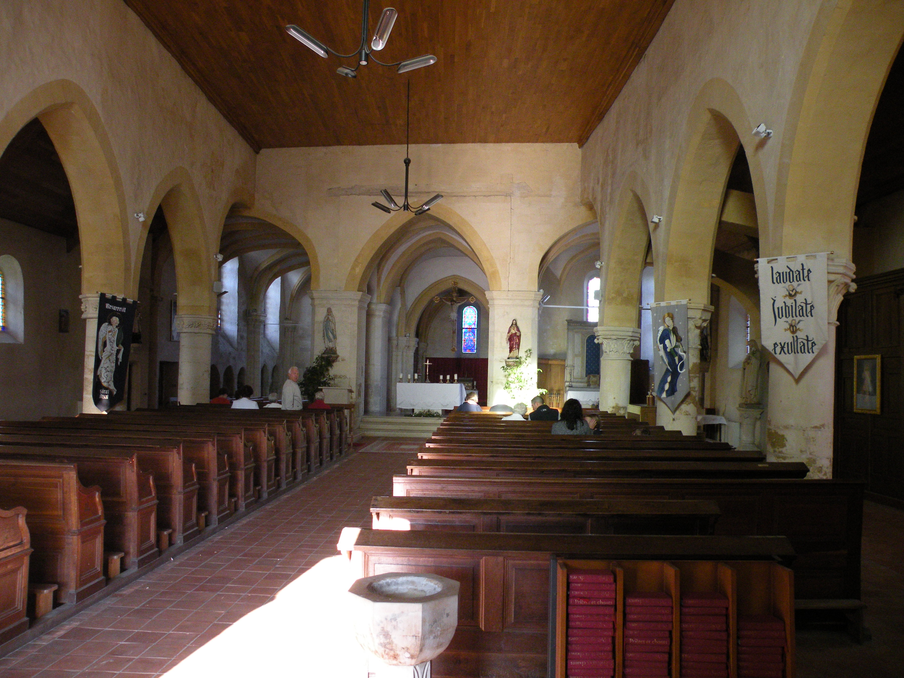 Intérieur de l'église Saint-Denis de Bornel